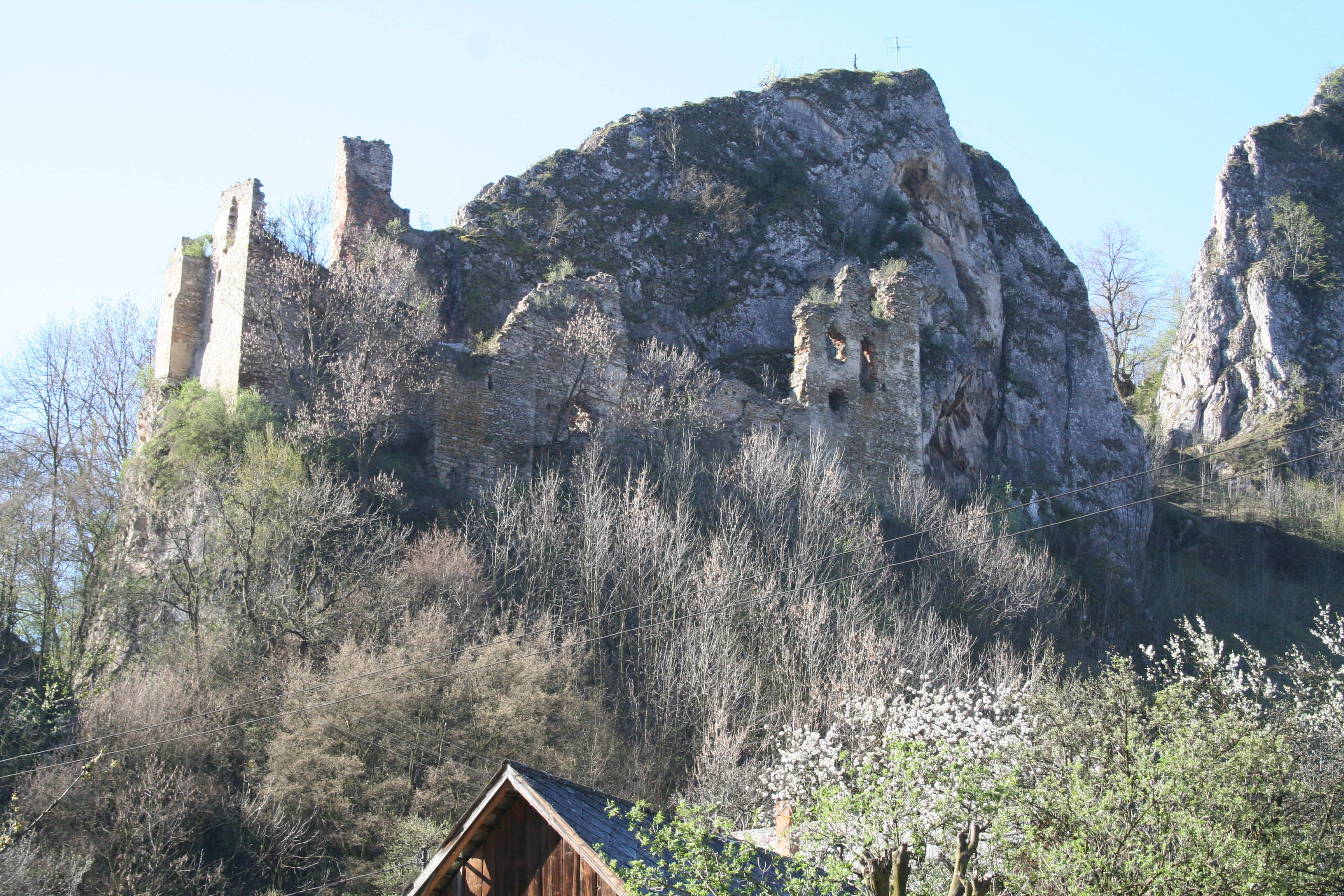 Lednický hrad, foceno z náměstí.